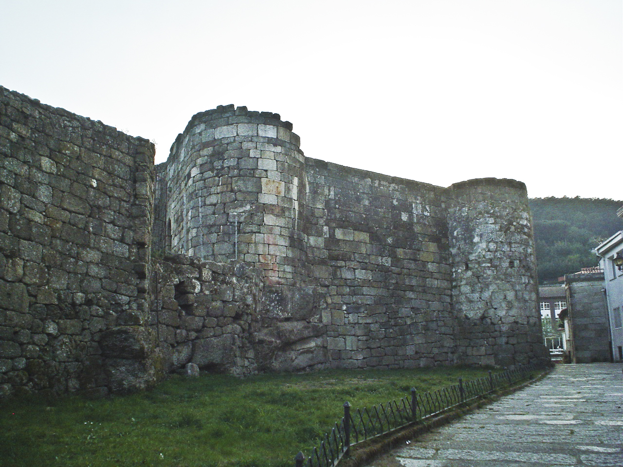 Castelo de Ribadavia, vista parcial.